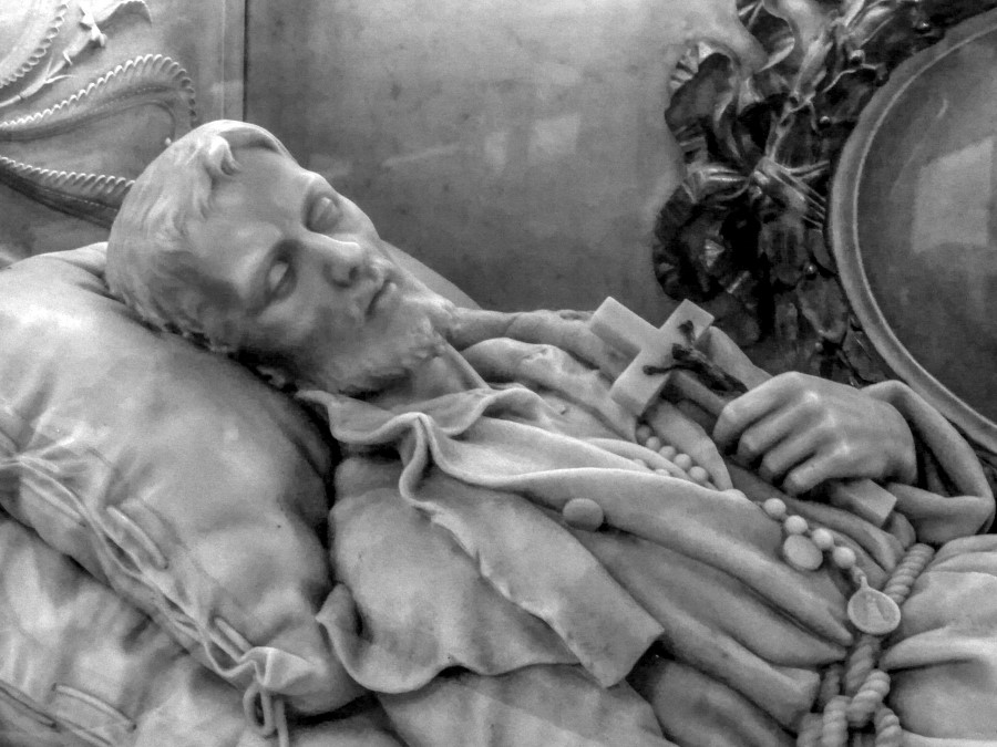 Gisant de Saint Benoit Joseph Labre (église Sainte Marie des Monts, Rome, Italie)